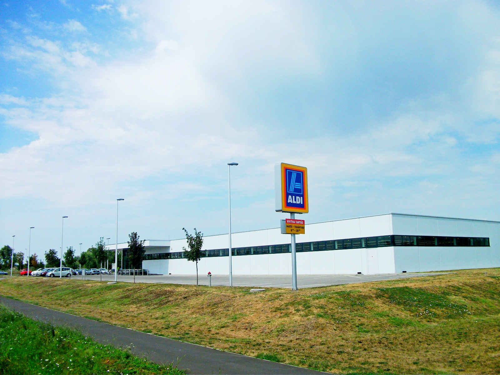 Az Aldi diszkontáruház-lánc üzlete Hajdúszoboszlón.